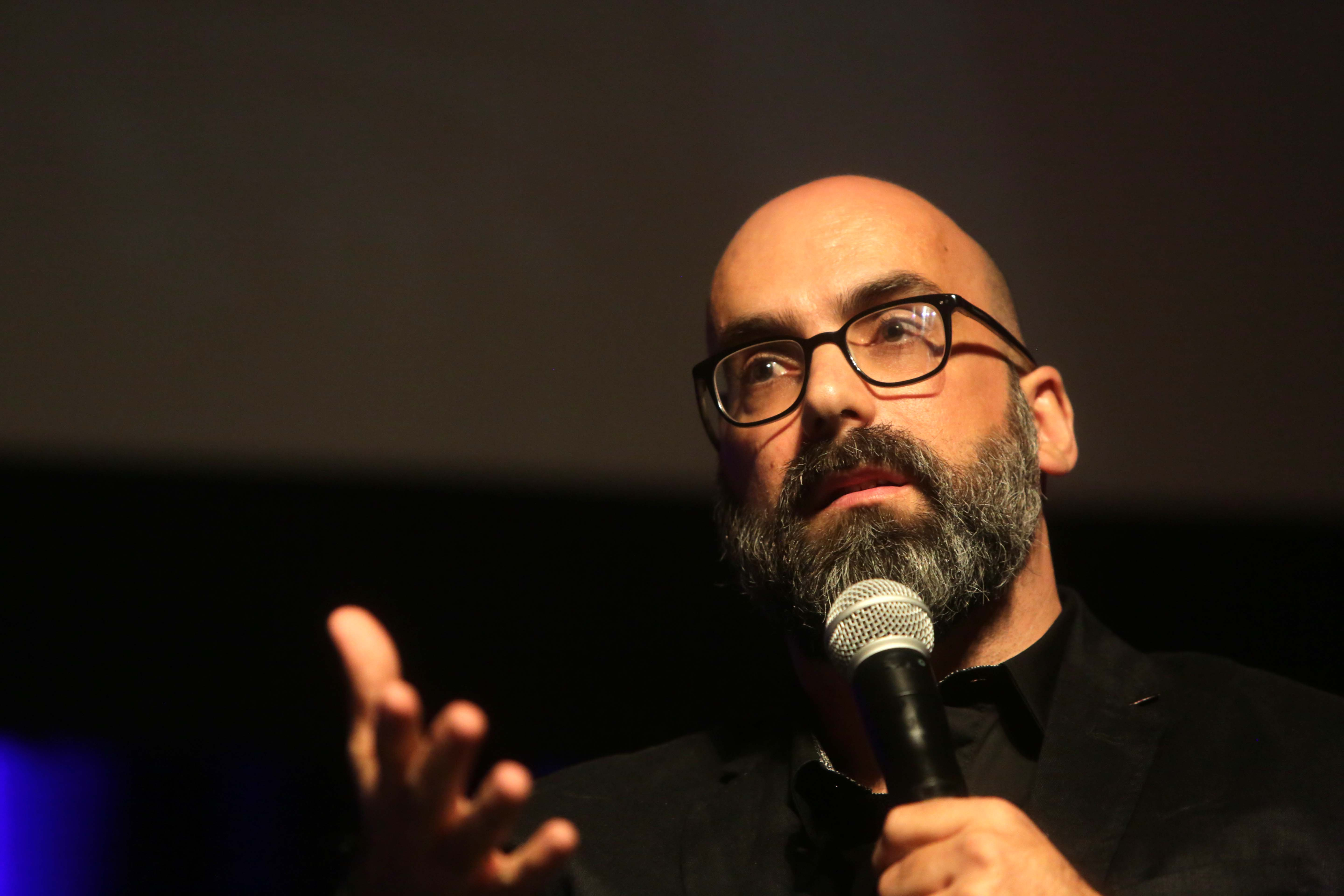 Convidado: Valter Hugo Mãe, escritor português Data: 31 de agosto de 2016 Local: Teatro Cetip-Complexo Ohtake Cultural Crédito das imagens: Fronteiras do Pensamento | Greg Salibian